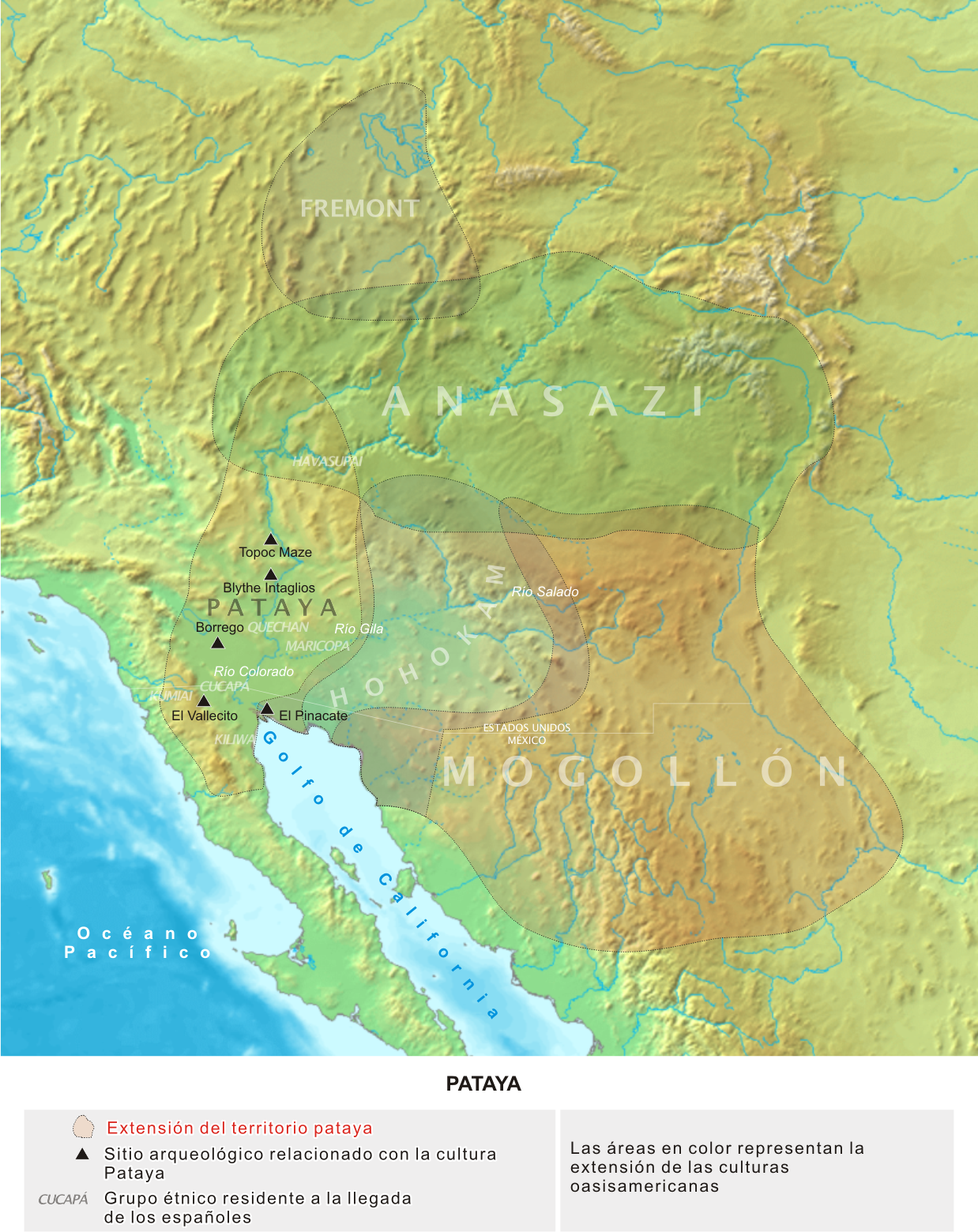 Localización de la cultura pataya, en el poniente de Oasisamérica